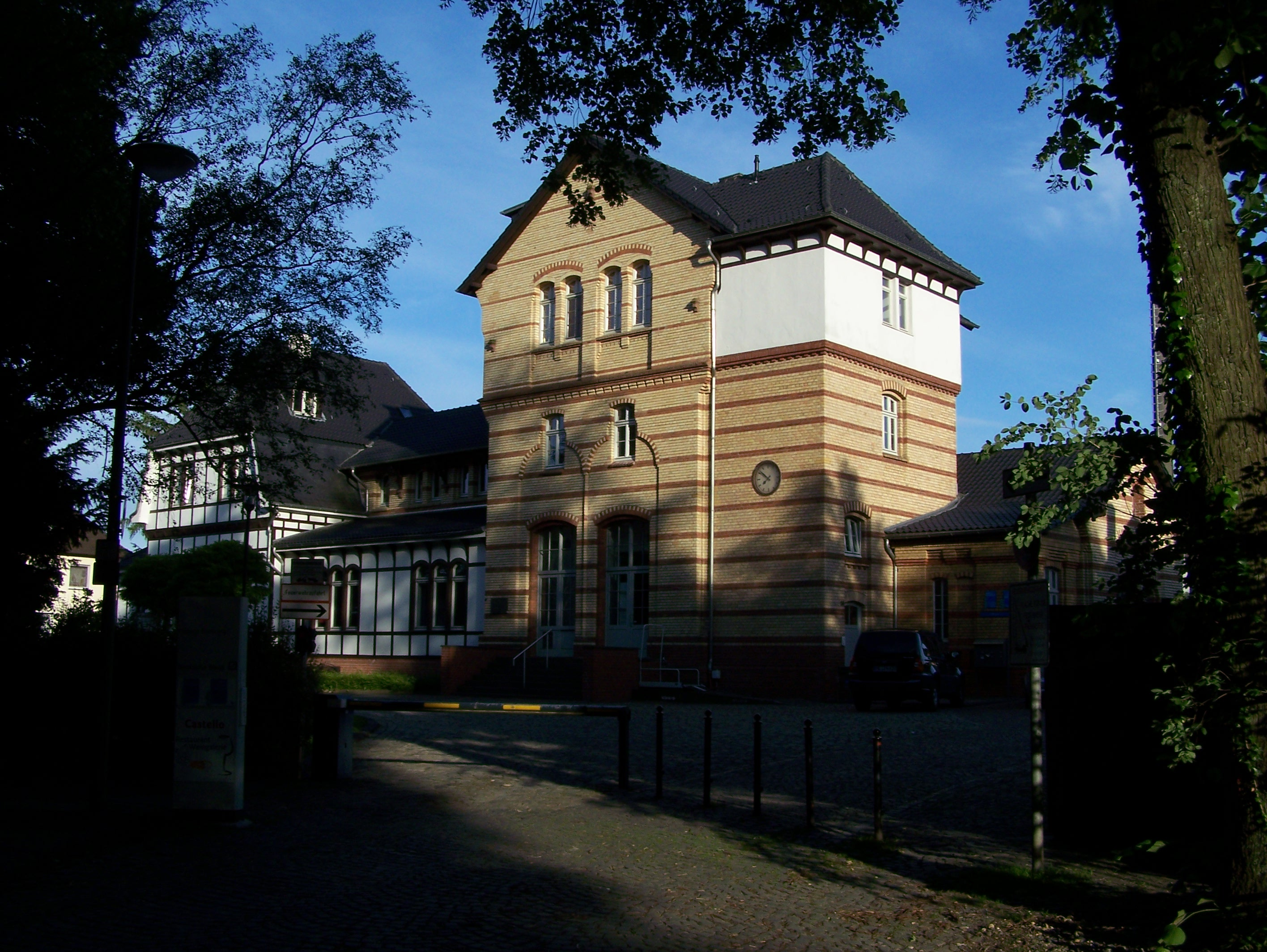 Historisches Bahnhofsgebäude in Mettmann, Nordrhein-Westfalen, Deutschland.